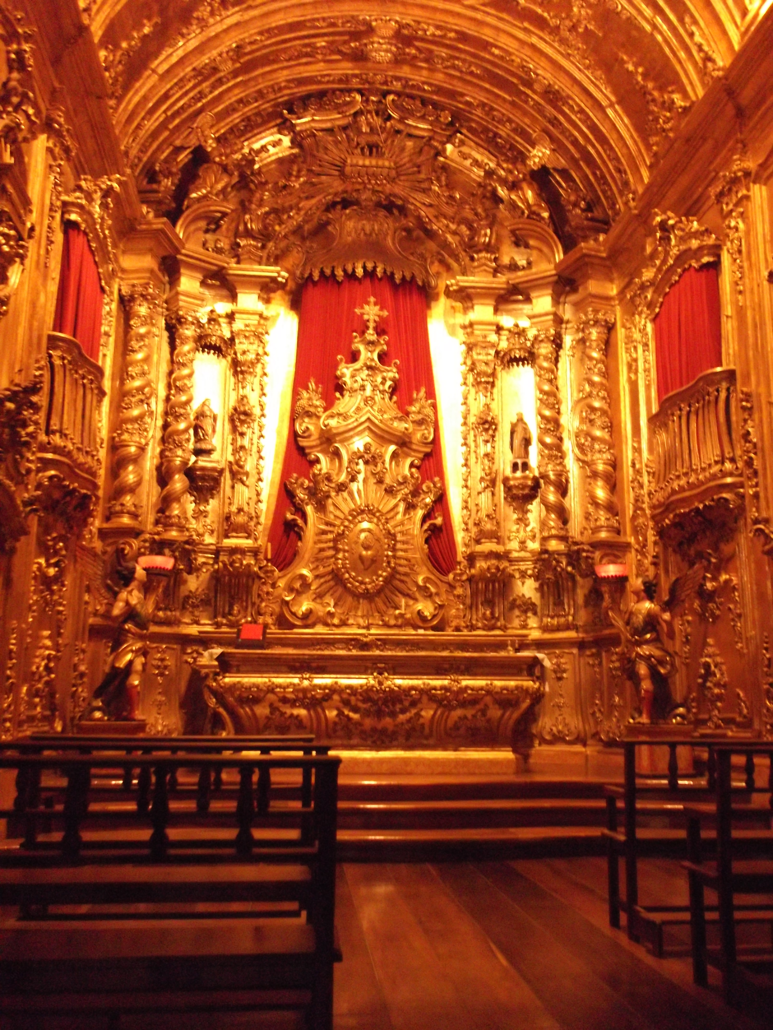 Mosteiro de São Bento (Rio de Janeiro) : Capela do Santíssimo Sacramento